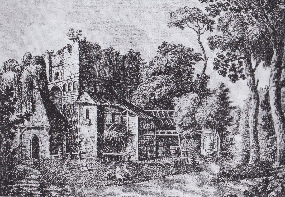 Il vecchio tempio di Giano in rovina, nel parco di Villa Ghirlanda Silva, a Cinisello.